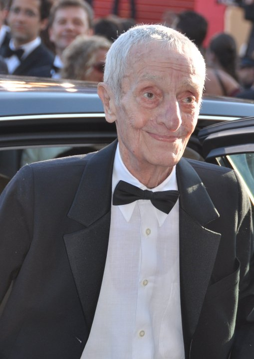 Jacques Herlin au festival de Cannes